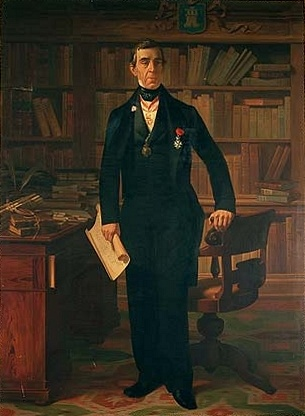 Retrat pòstum Pròsper de Bofarull i Mascaró